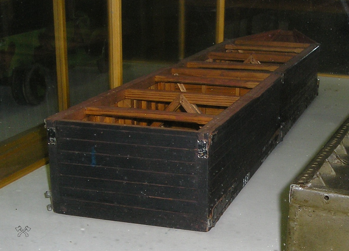 ДМП-42